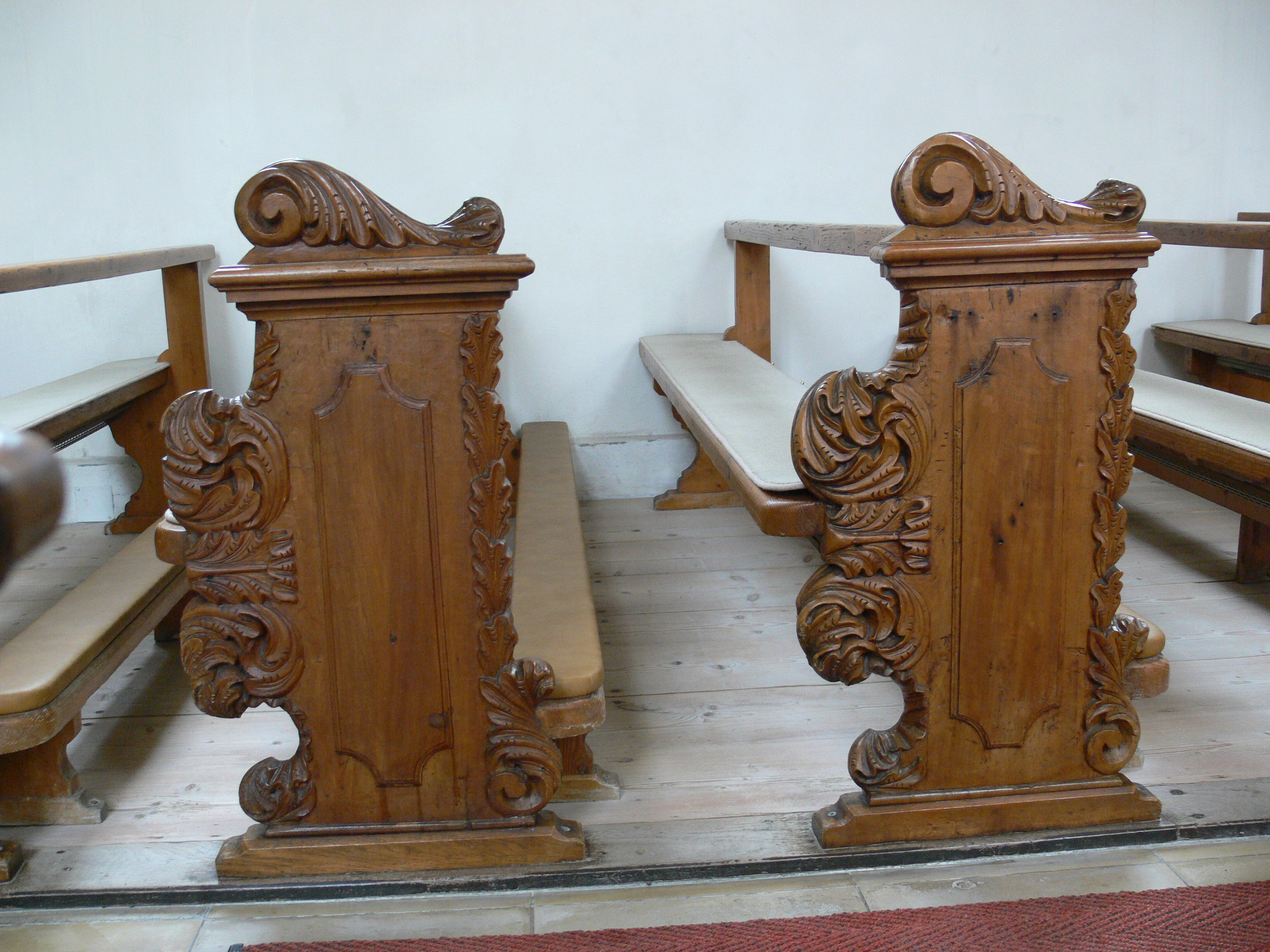 Kath. Pfarrkirche St. Martinus, Esenhausen, Gemeinde Wilhelmsdorf, Landkreis Ravensburg, Baden-Württemberg Kirchenbänke